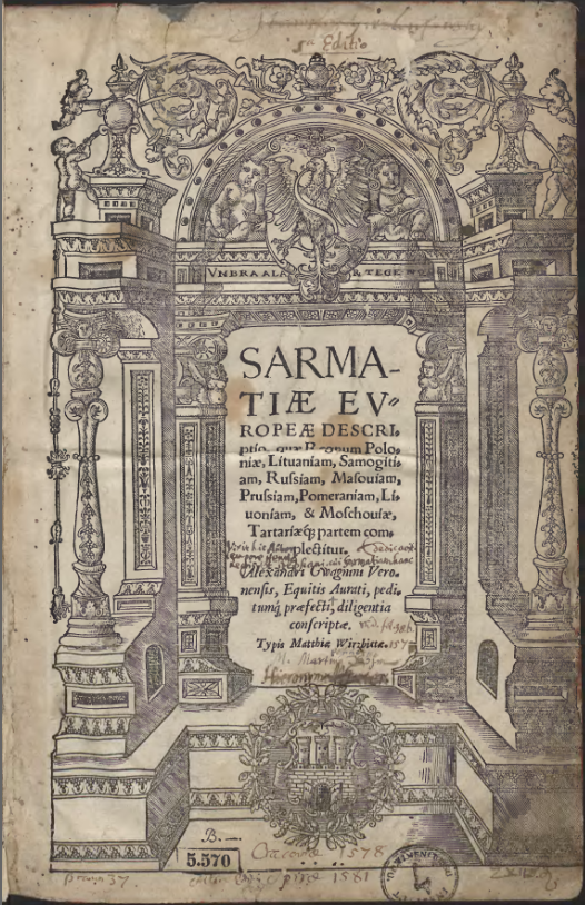 Апісанне Еўрапейскай Сарматыі (Sarmatiae Europeae descriptio). Кракаў. 1578